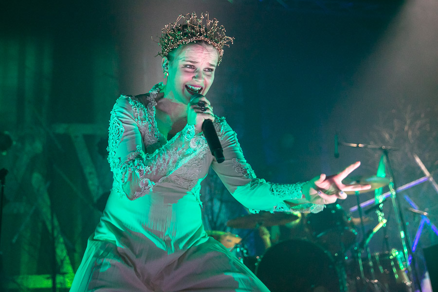 Gåte på Sentrum Scene.